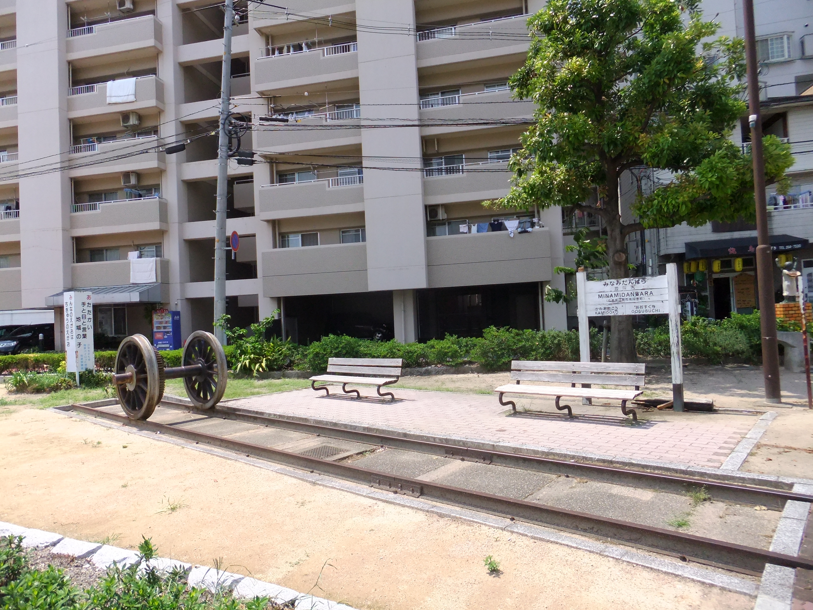 南段原駅跡モニュメント